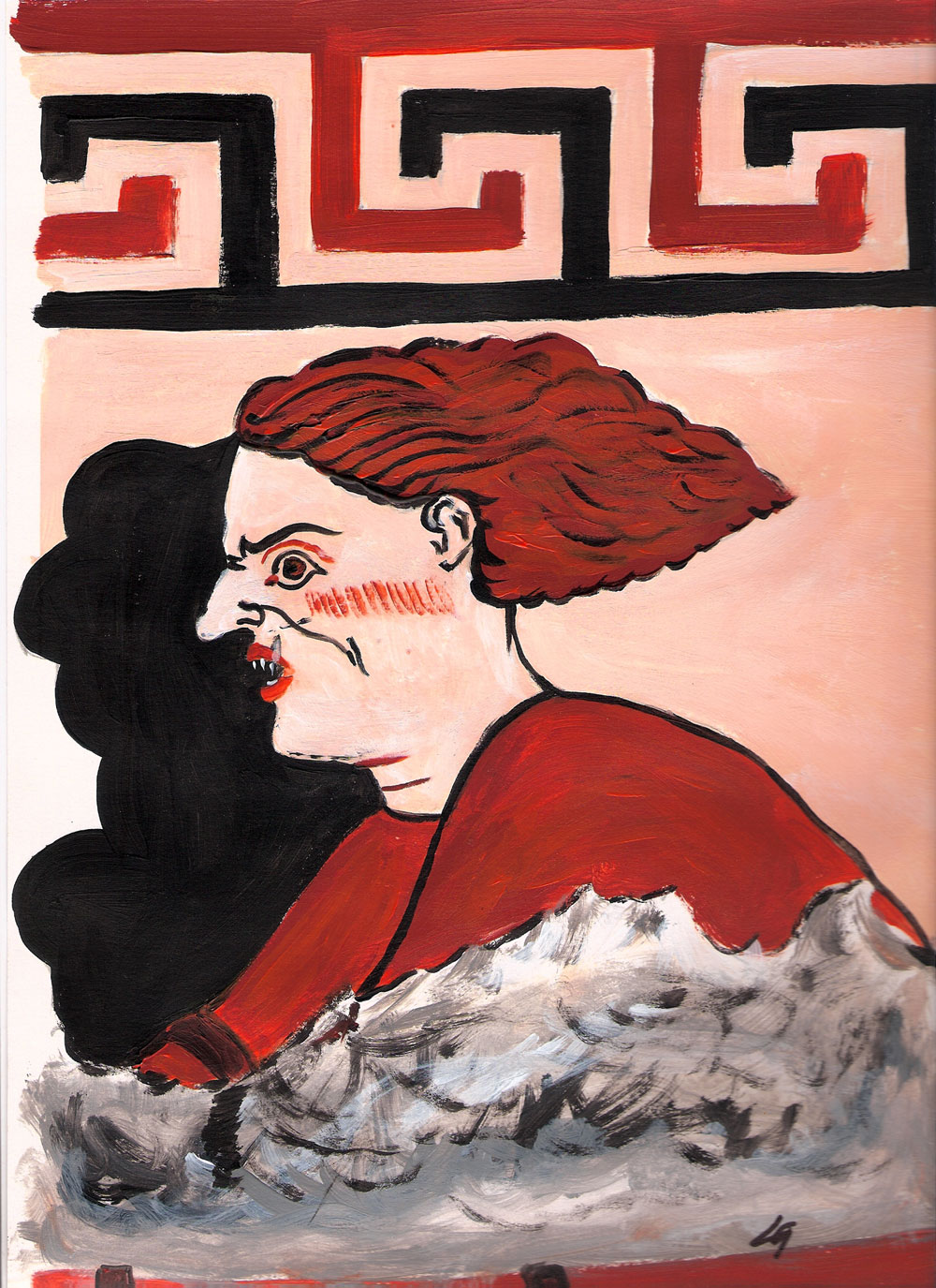 Charun sur les fresques de la Tombe du quadrige infernal - vue d'artiste de louis-garden